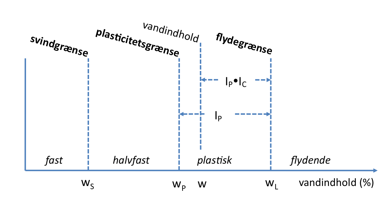 Konsistensgrænser: svindgrænse, plasticitetsgrænse og flydegrænse